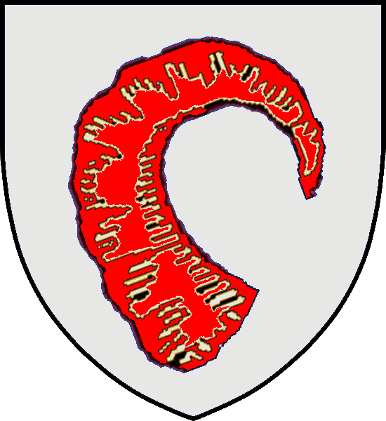 Vapensköld för danska adelsätten Bydelsbach